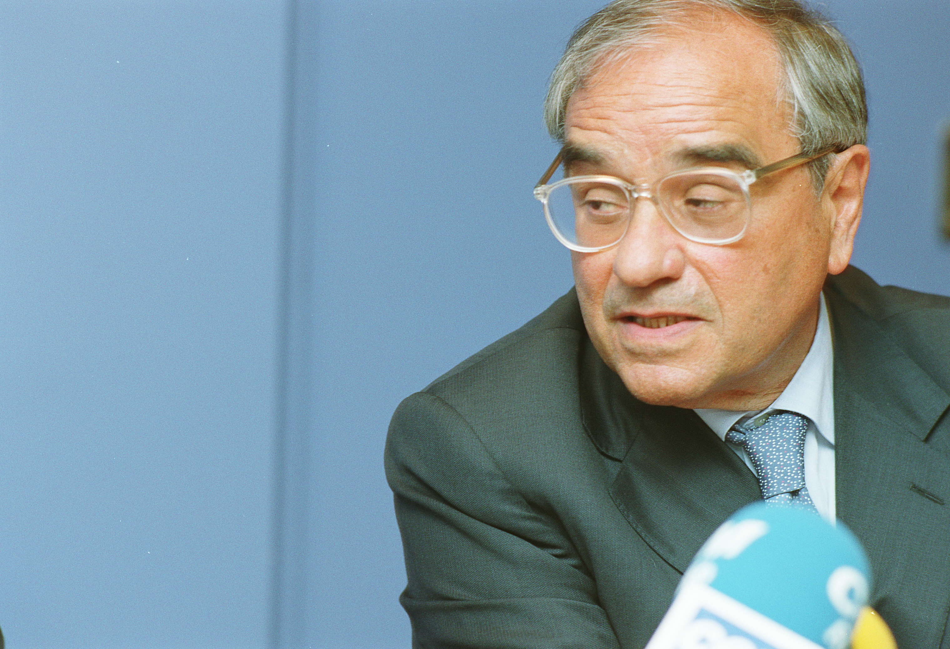 Martín Villa al MHC el 2001.